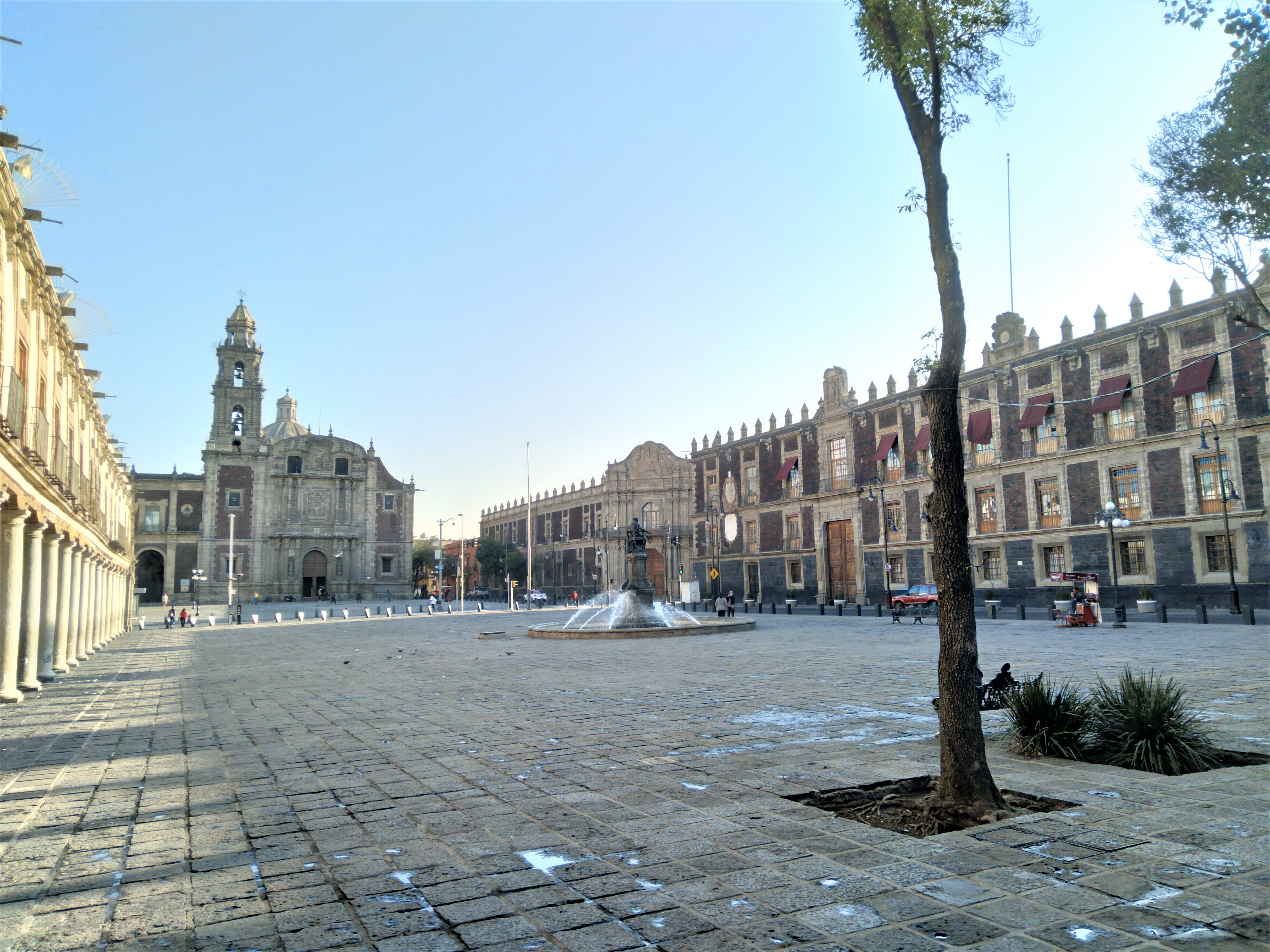 Plaza de Santo Domingo en el centro histórico de la ciudad de México